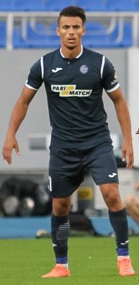 Моха - мароканський футболіст Олімпіка (Донецьк)